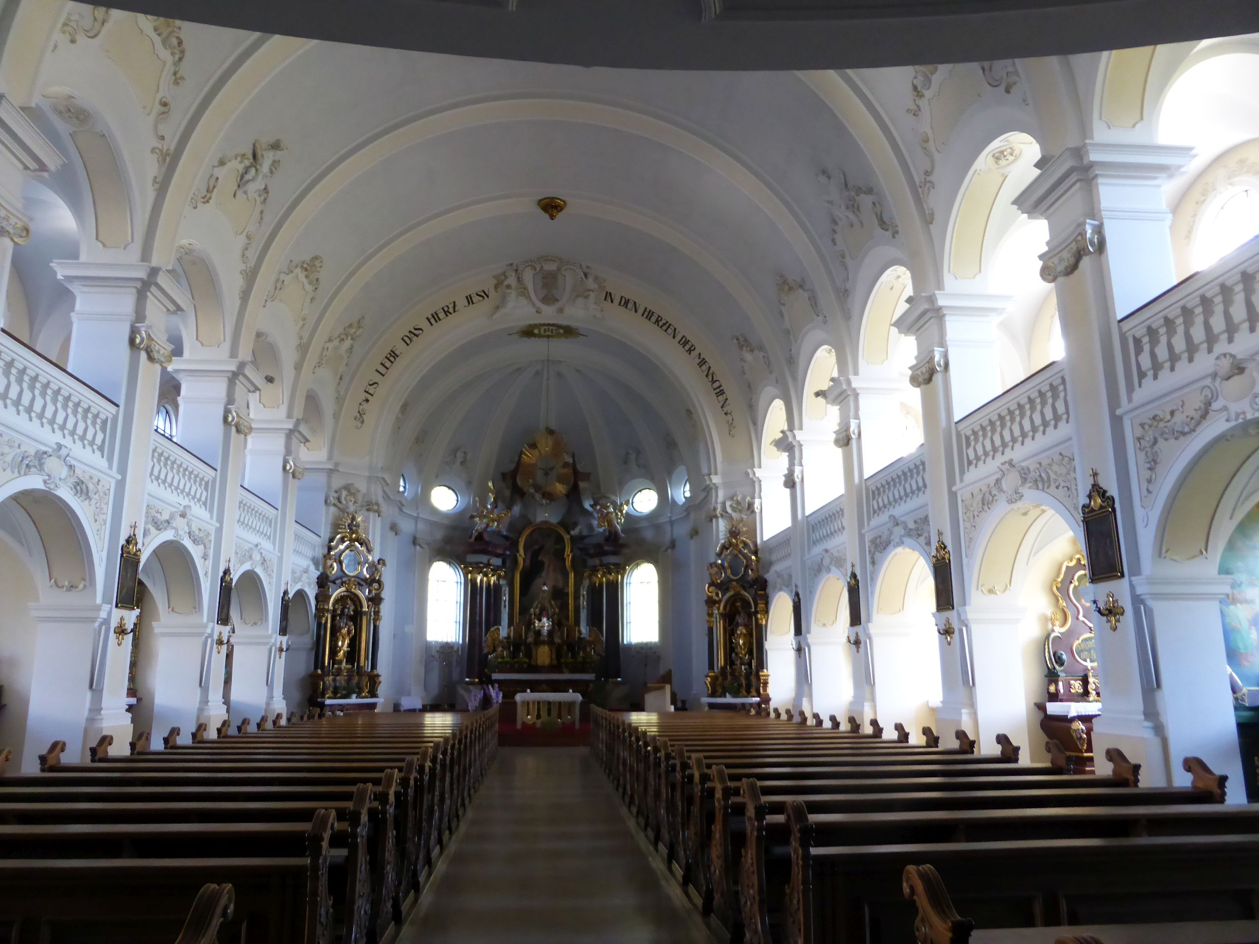 Kreuzbergkirche